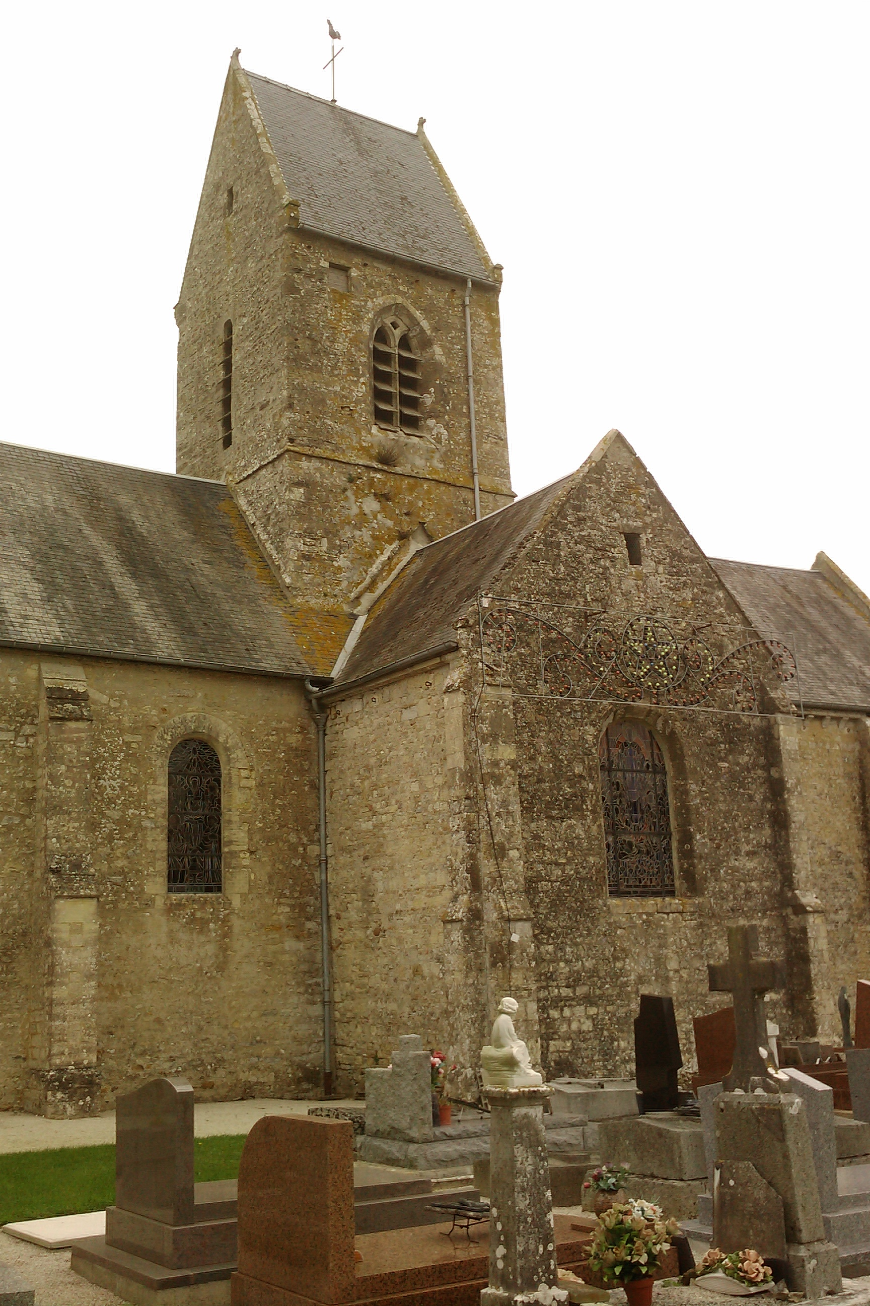 Église Saint-Martin de Brévands